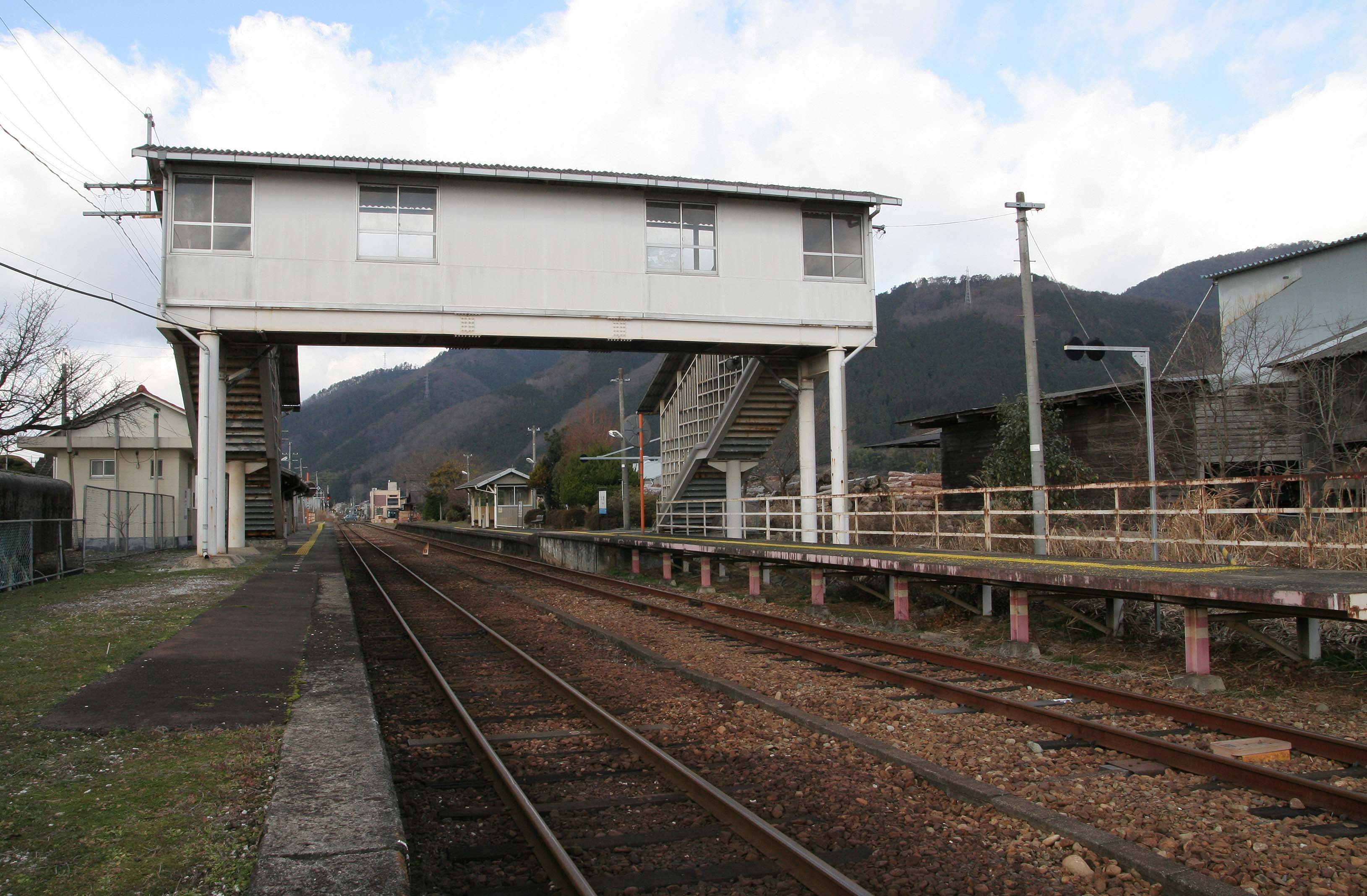 久世駅の構内